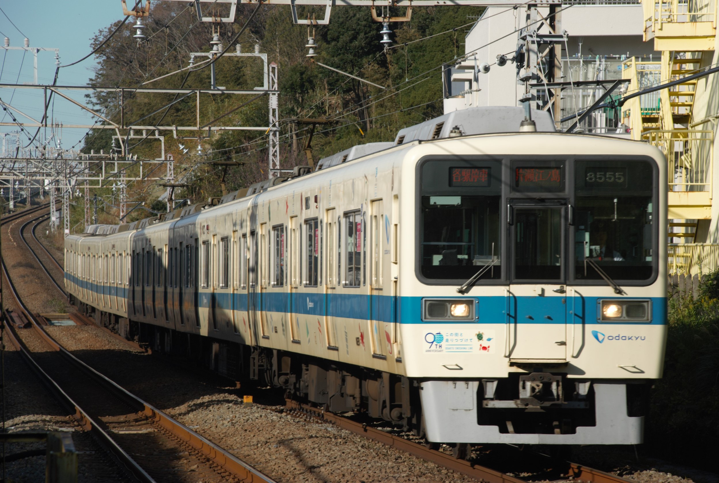 善行で撮影しました